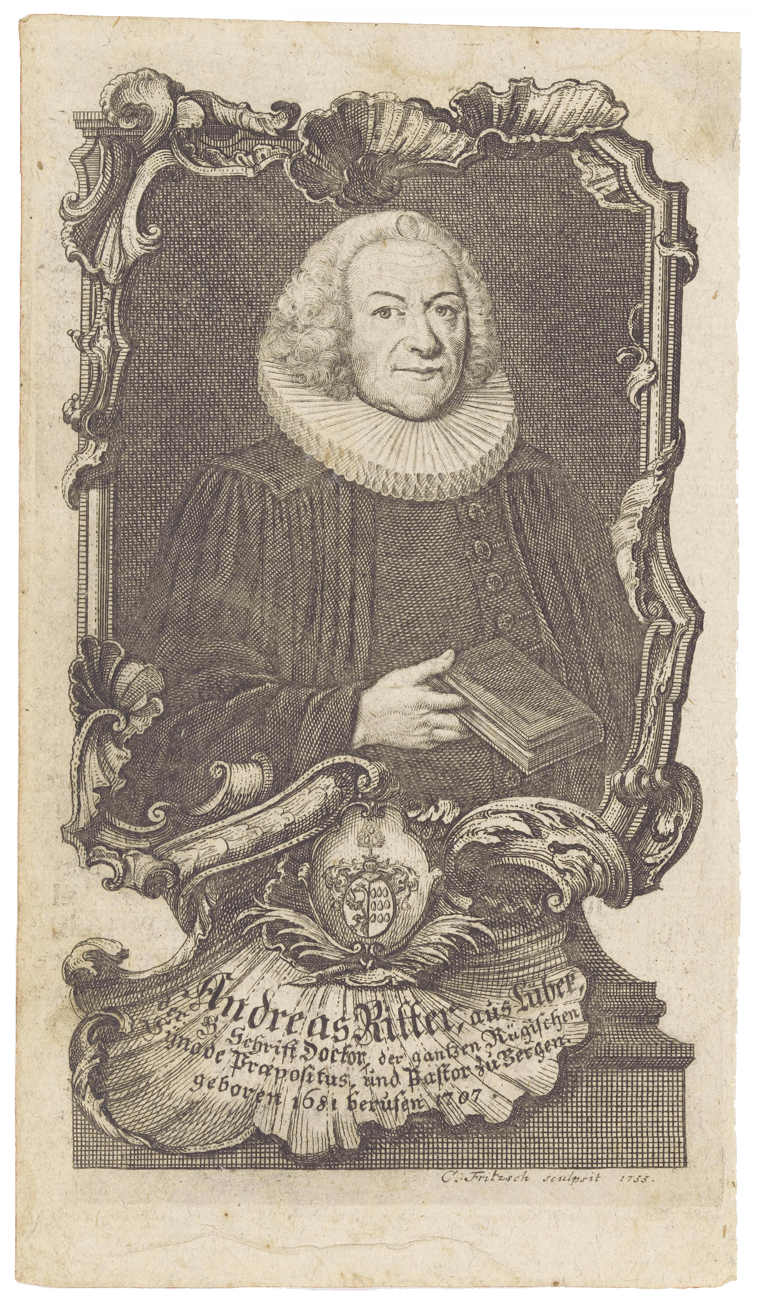 Lutherischer Theologe Dr. Andreas Ritter (1681-1755) aus Lübeck. Sohn von Georg R. (1639-1706) Pastor von St. Petri und Senior der Geistlichkeit in Lübeck. Andreas Ritter war Dozent an der Universität Greifswald und Pastor an St. Marien in Bergen auf Rügen. Er war verheiratet mit Catharina Bebel + 1739) eine Tochter des Superintendenten in Wittenberg, Balthasar B. Porträt aus dem Jahre 1755 von dem hamburger Kupferstecher Christian Fritzsch (1695-1769)